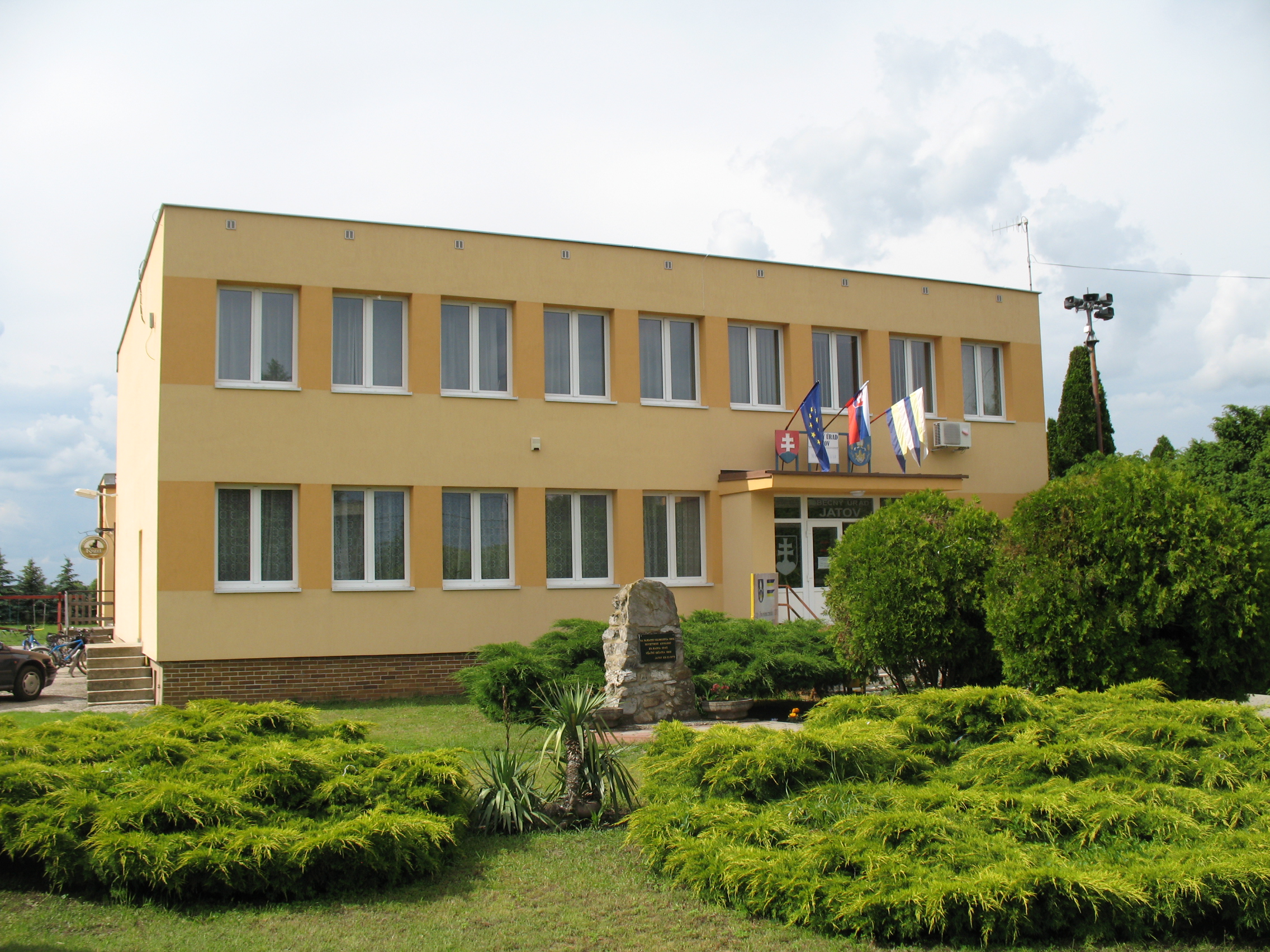 Jattó